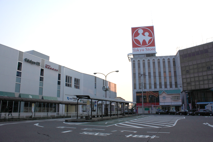 伊勢原駅南口ロータリー。2009年6月27日午前5時撮影。